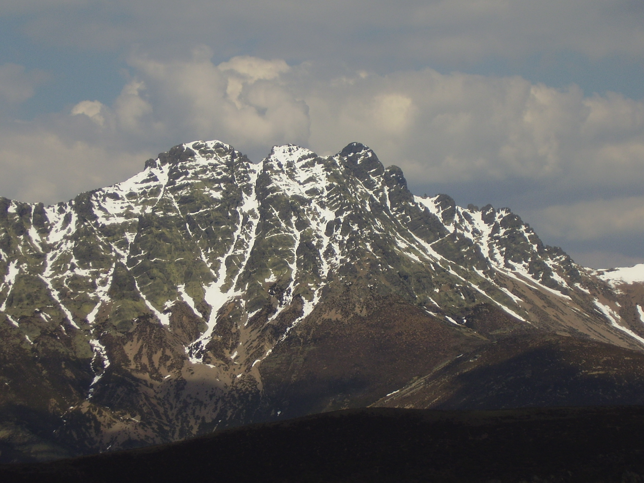 Imagen del Pico Curavacas